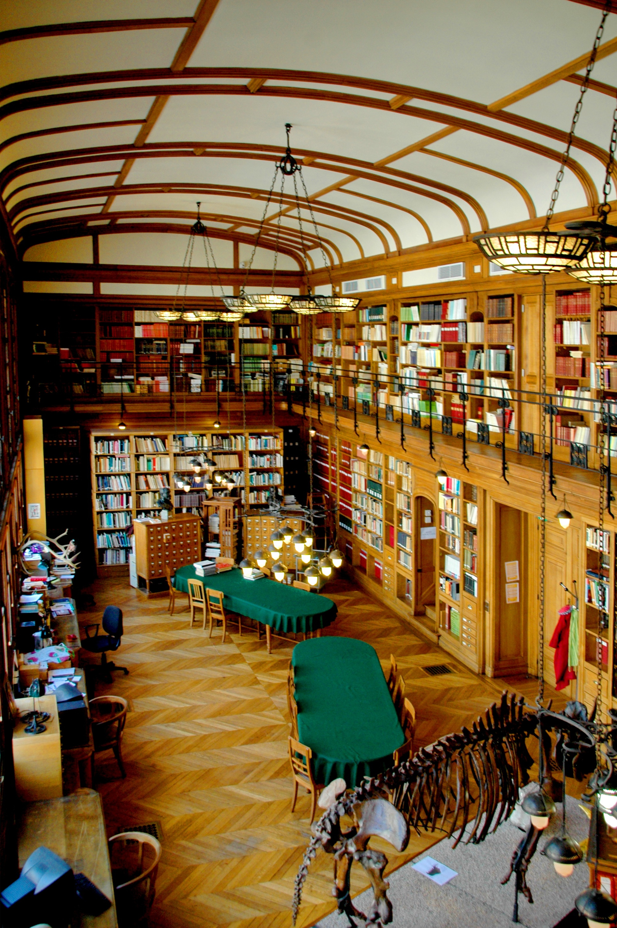 Vue de la bibliothèque de l'IPH